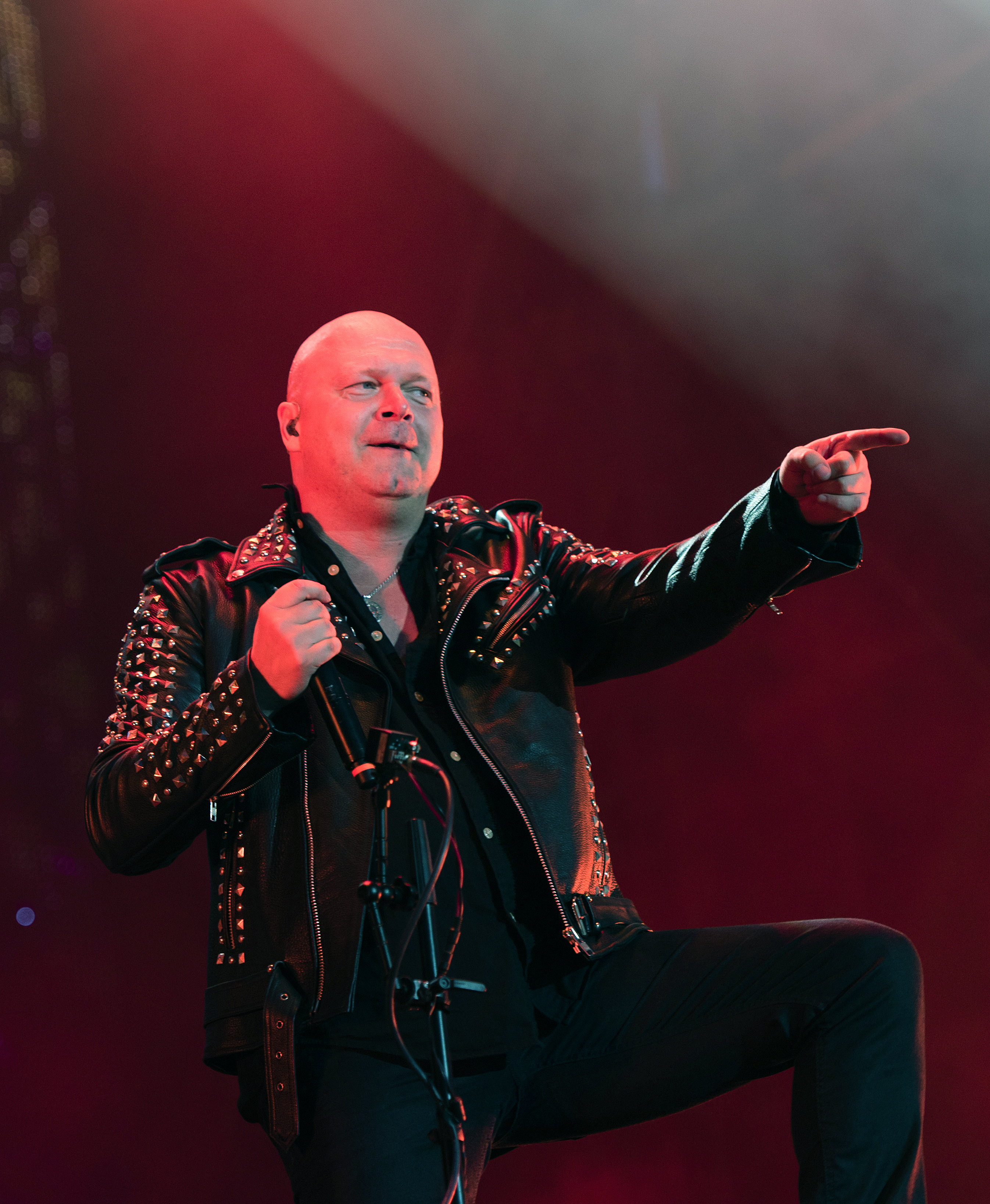 Helloween - Pumpkins United beim Wacken Open Air 2018